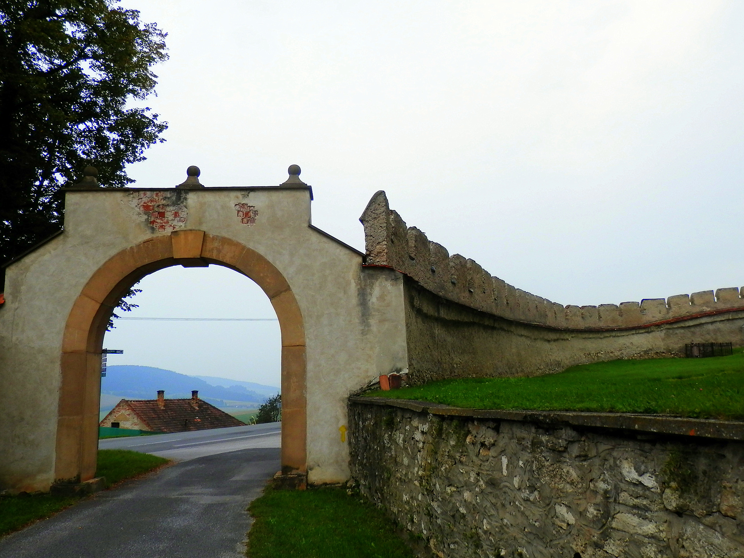 Opevnenie cirkevného mestečka s dvoma vstupnými bránami, postavili v 14. storočí a viackrát ho prestavali. Spišská Kapitula-Spišské Podhradie. Južná strana opevnenia